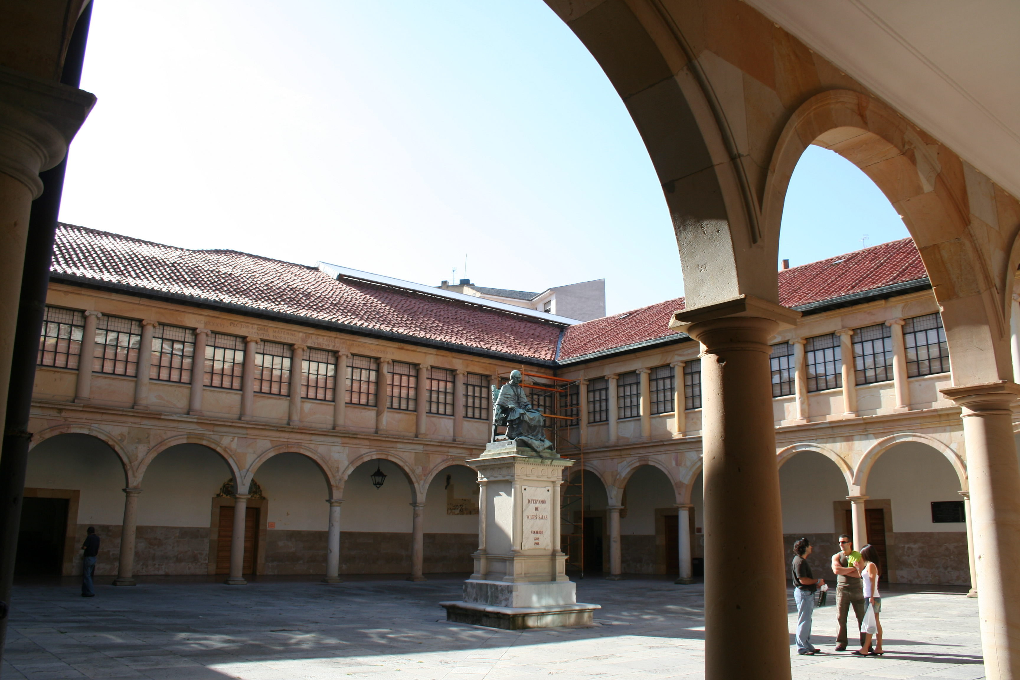 Claustro edificio histórico de la Universidad de Oviedo .JPG